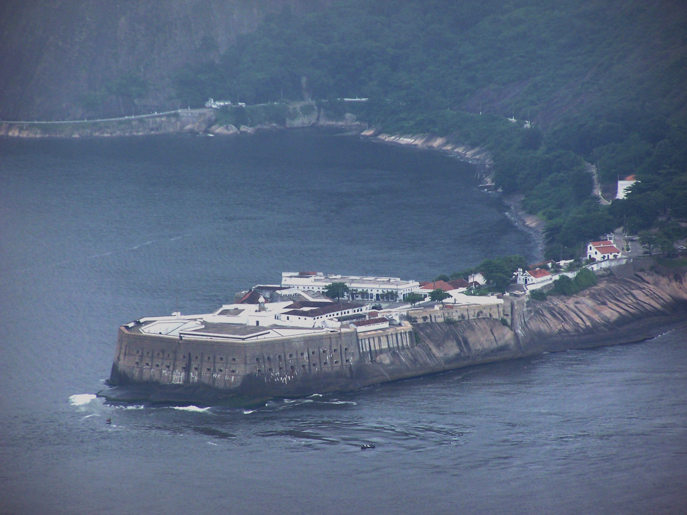 Santa Cruz Fortress in Niterói (Brazil)